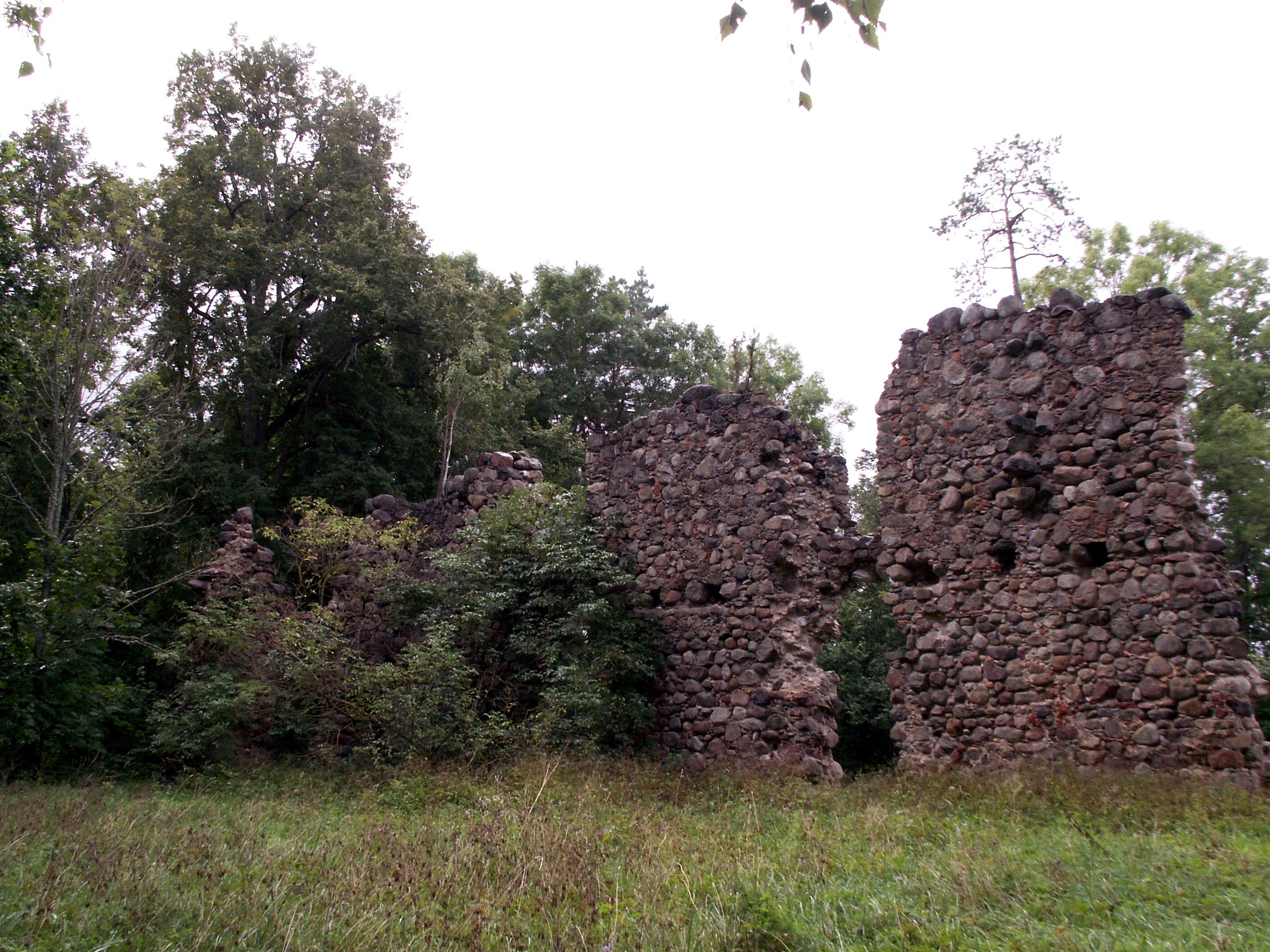 Livonijos ordino pilies liekanos Šventkalnyje, Tervetė, Tervetės pagastas, Latvija